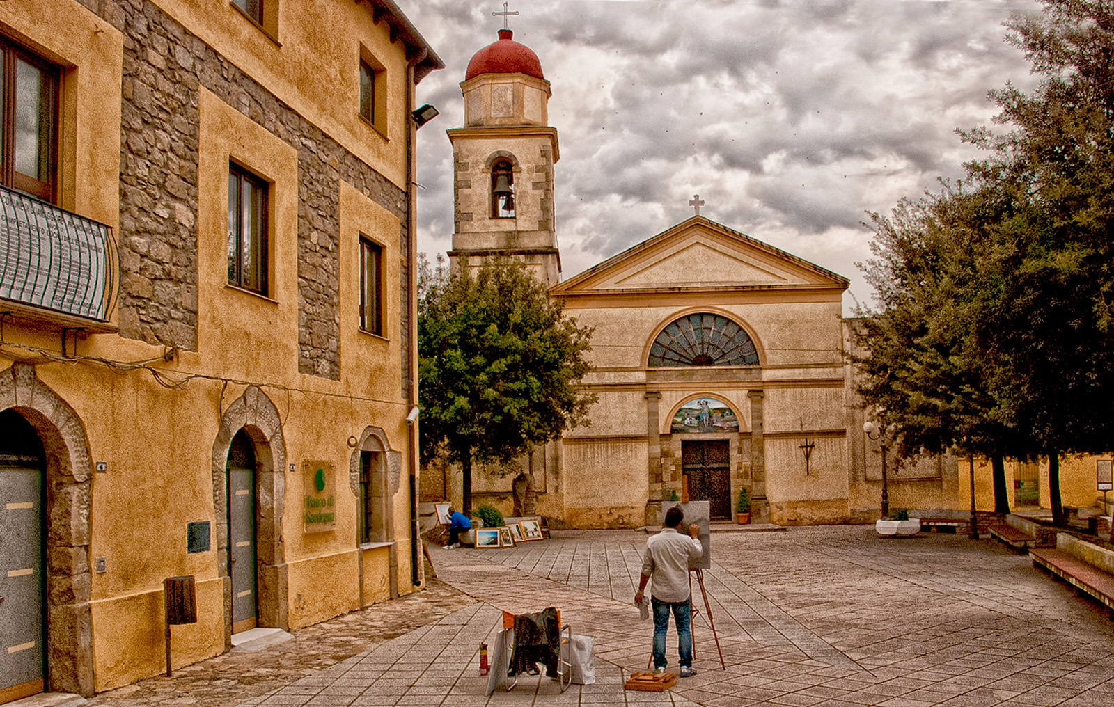 Chiesa Parrocchiale di San Sebastiano martire in Guamaggiore (Sardegna)